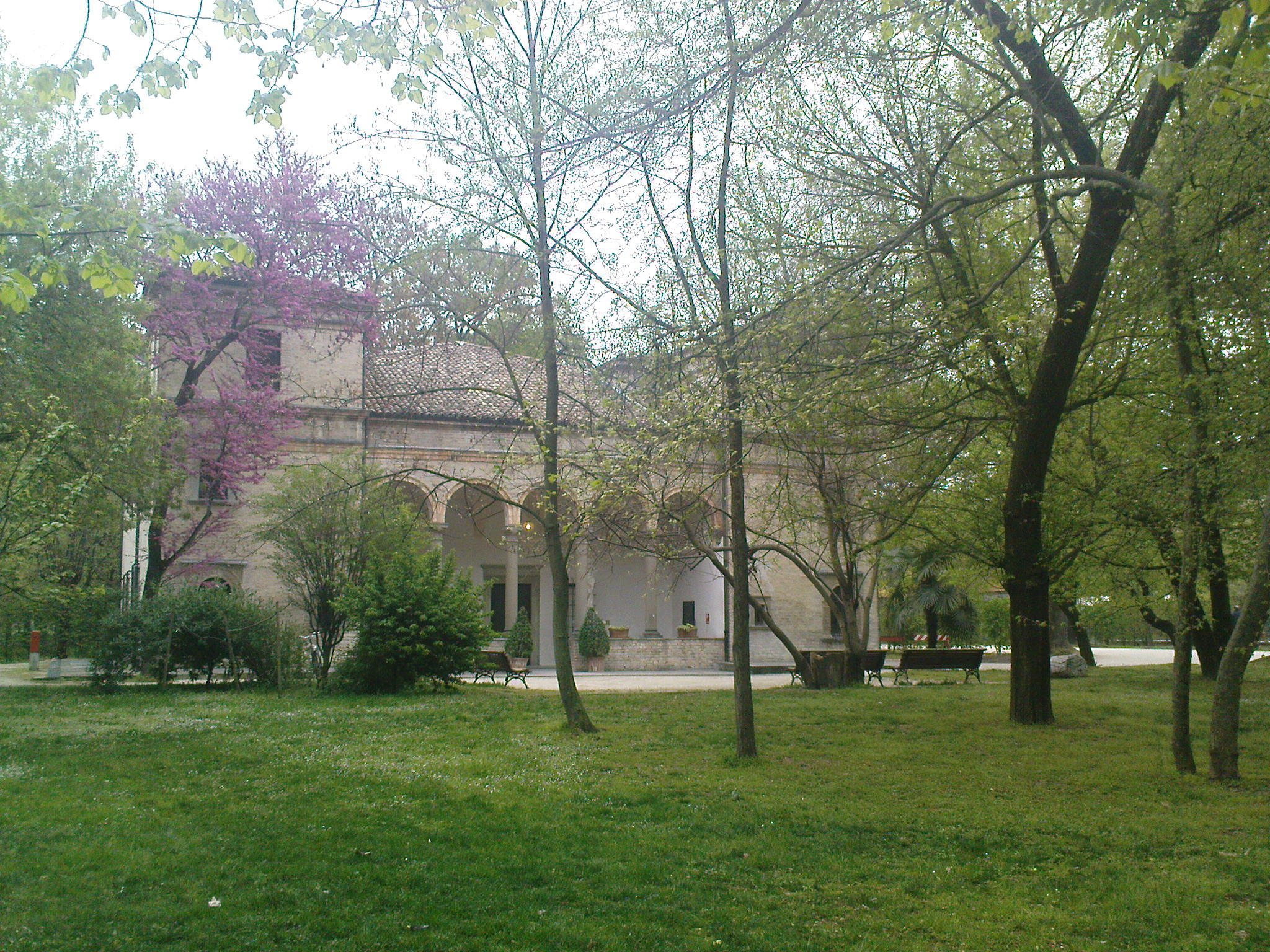 Palazzetto Eucherio Sanvitale o del Coccodrillo (XV secolo)